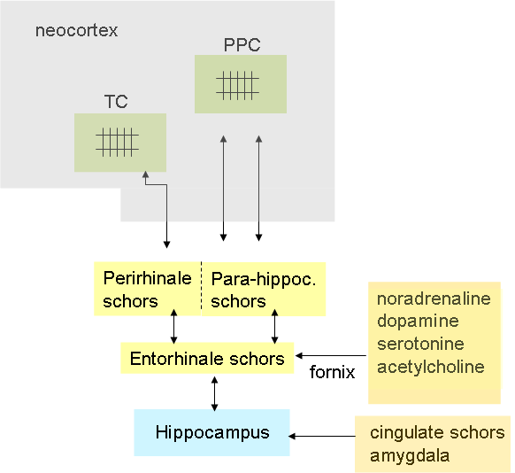 Het hippocampus geheugensysteem volgens de theorie van Squire en Zola-Morgan. Aangegeven zijn de gebieden rondom de hippocampus, en in de neocortex de posterieure pariëtale cortex (PPC) en temporale cortex (TC). Onderaan: de neutransmitters die de entorinale schors via de fornix bereiken, en de voornaamste verbindingen tussen hippocampus en gebieden in het limbisch systeem.